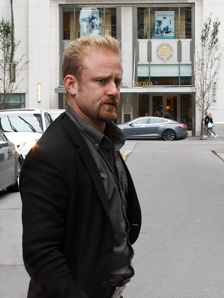 Toronto International Film Festival 2015